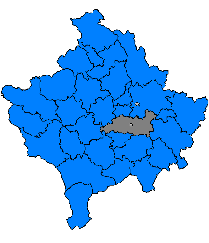 Lipjan, Kosovë 2006